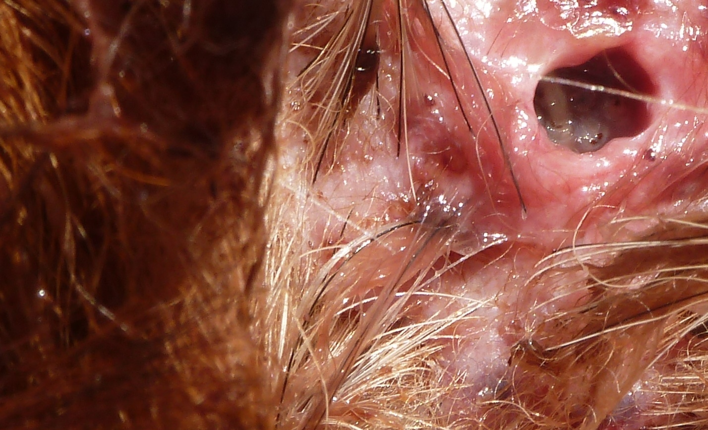 Larvas de Cochliomyia hominivorax en perro Pastor Belga